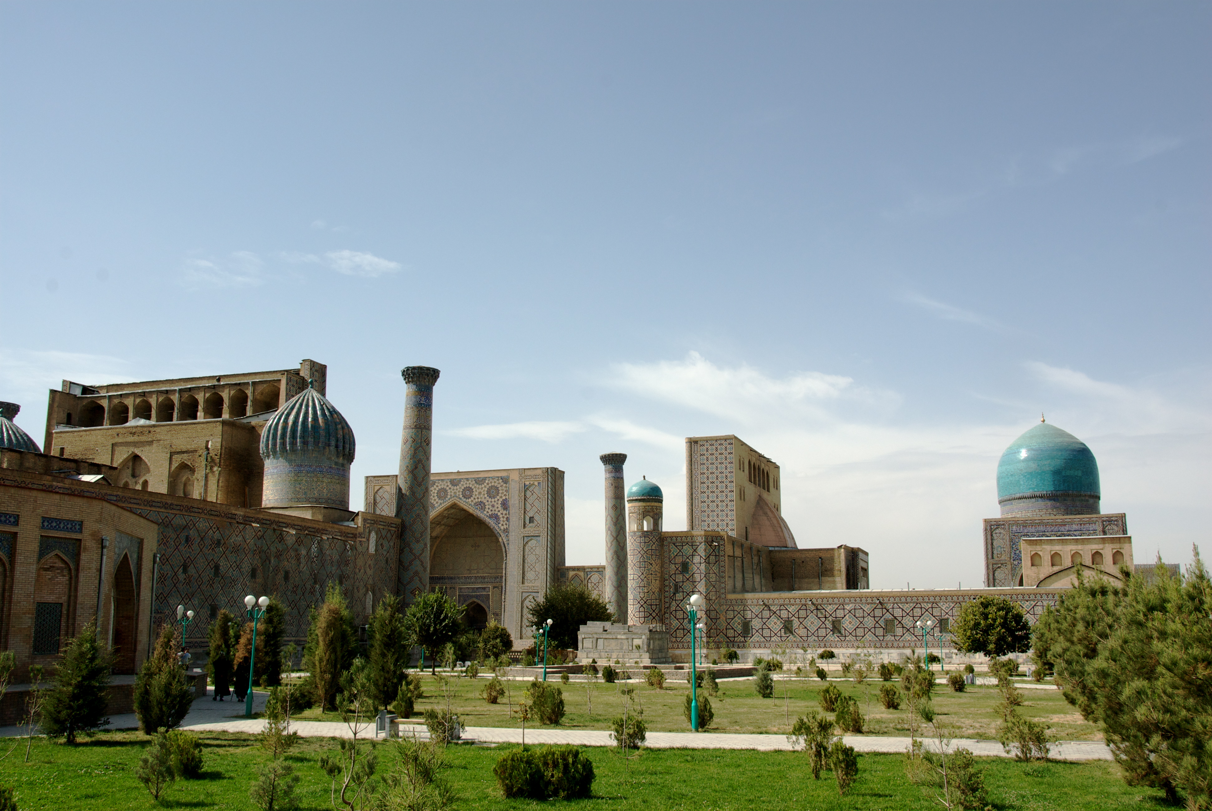 stans08-241